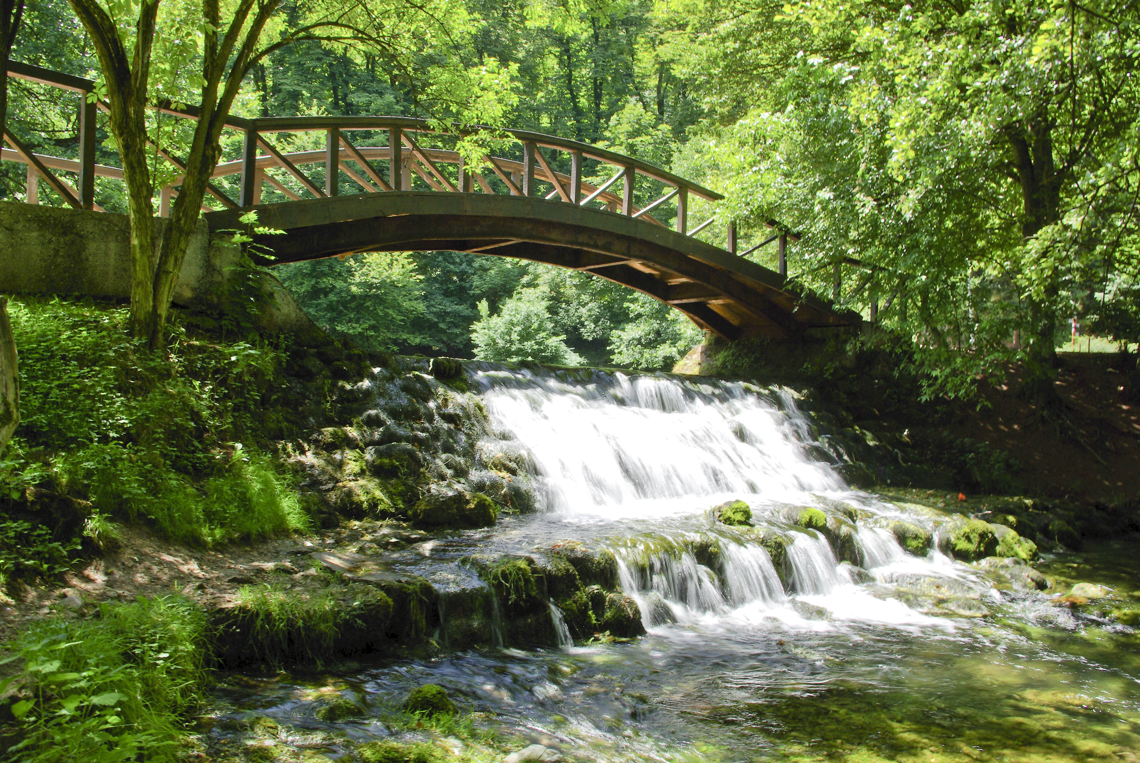 Sarajevo